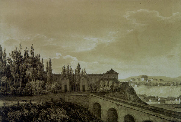 Grodno. Ryc. 2 z Serii I z "Albumu widoków przedstawiających miejsca historyczne...", Pińsk, 1875-1883.